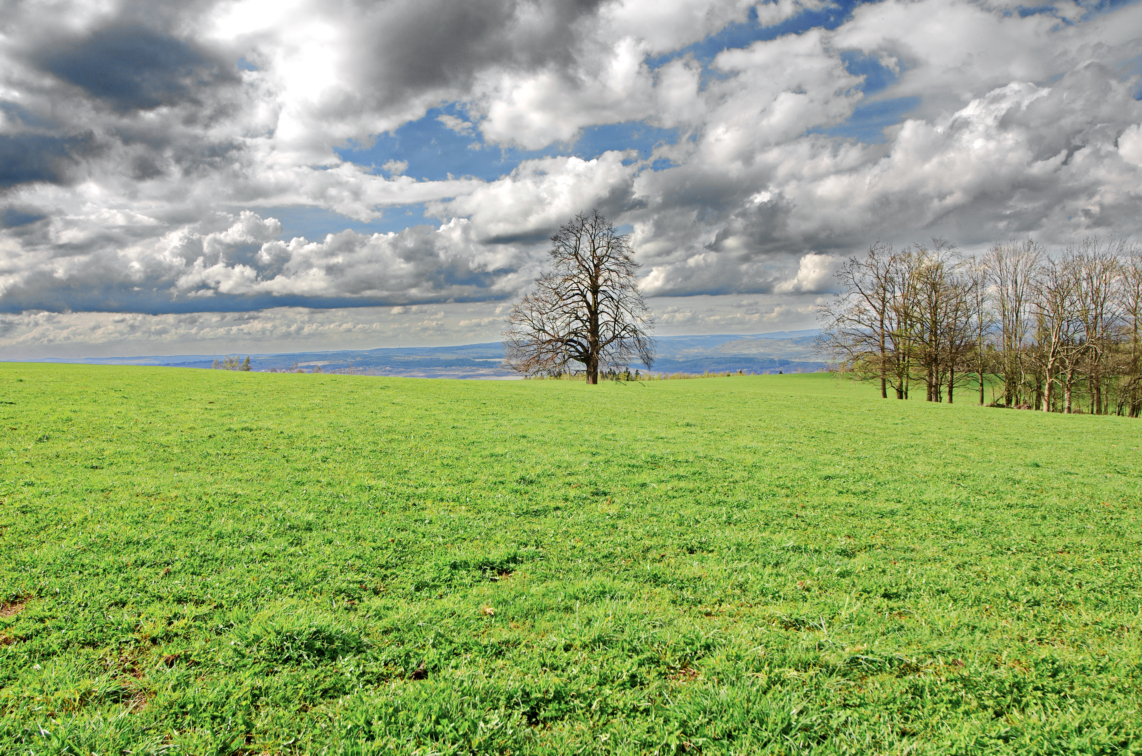 Památný strom Lípa na Paseckém vrchu, okres Sokolov